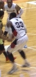 bjリーグ 東地区 リーグ戦・仙台89ERS vs 横浜ビー・コルセアーズ ゼビオアリーナ仙台（2015年3月）